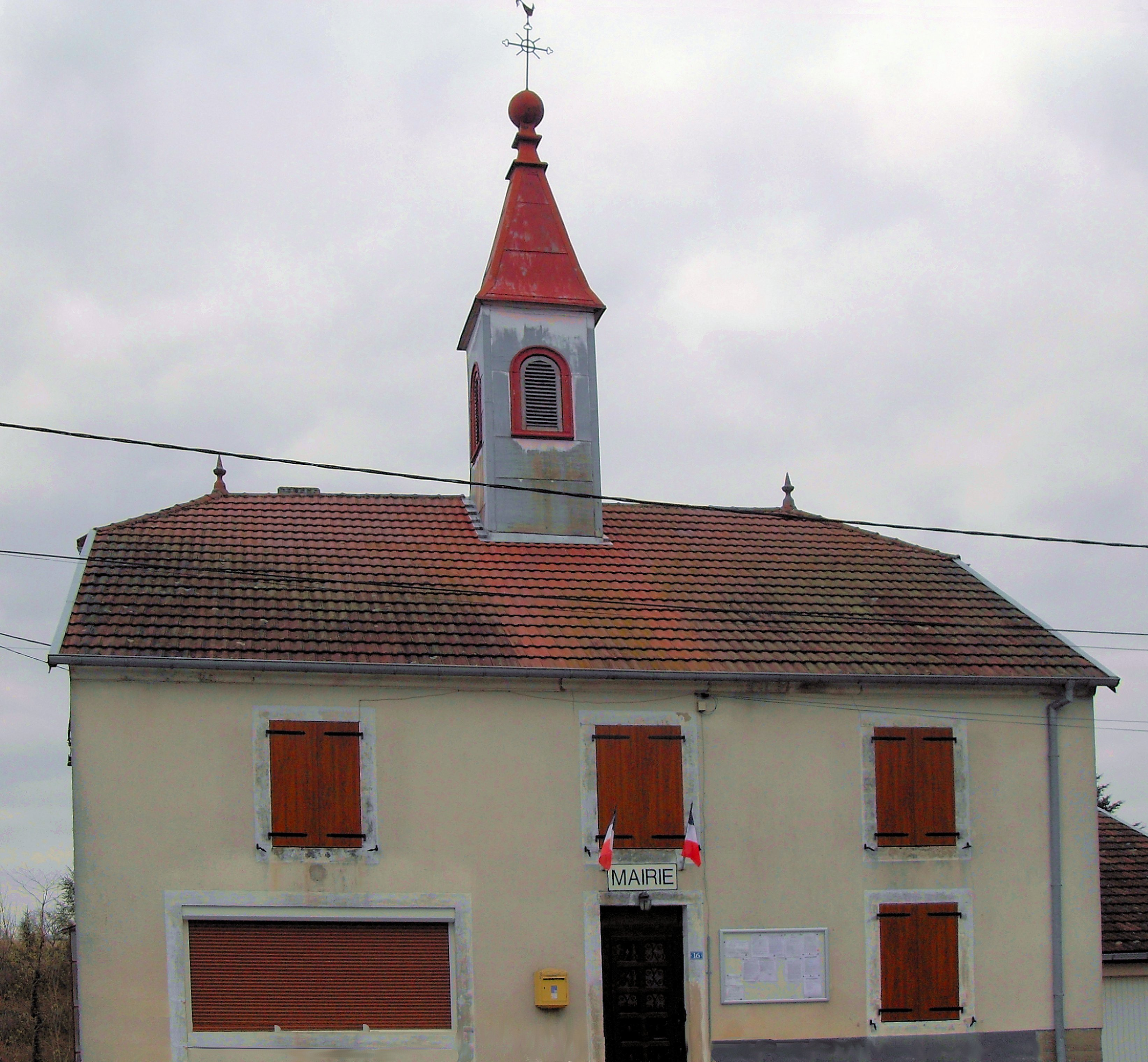 La mairie de Basse-Vaivre